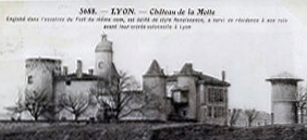 Château de La Motte (Lyon) propriété de la famille de Villeneuve à la fin du 15ème/tout début du 16ème siècle